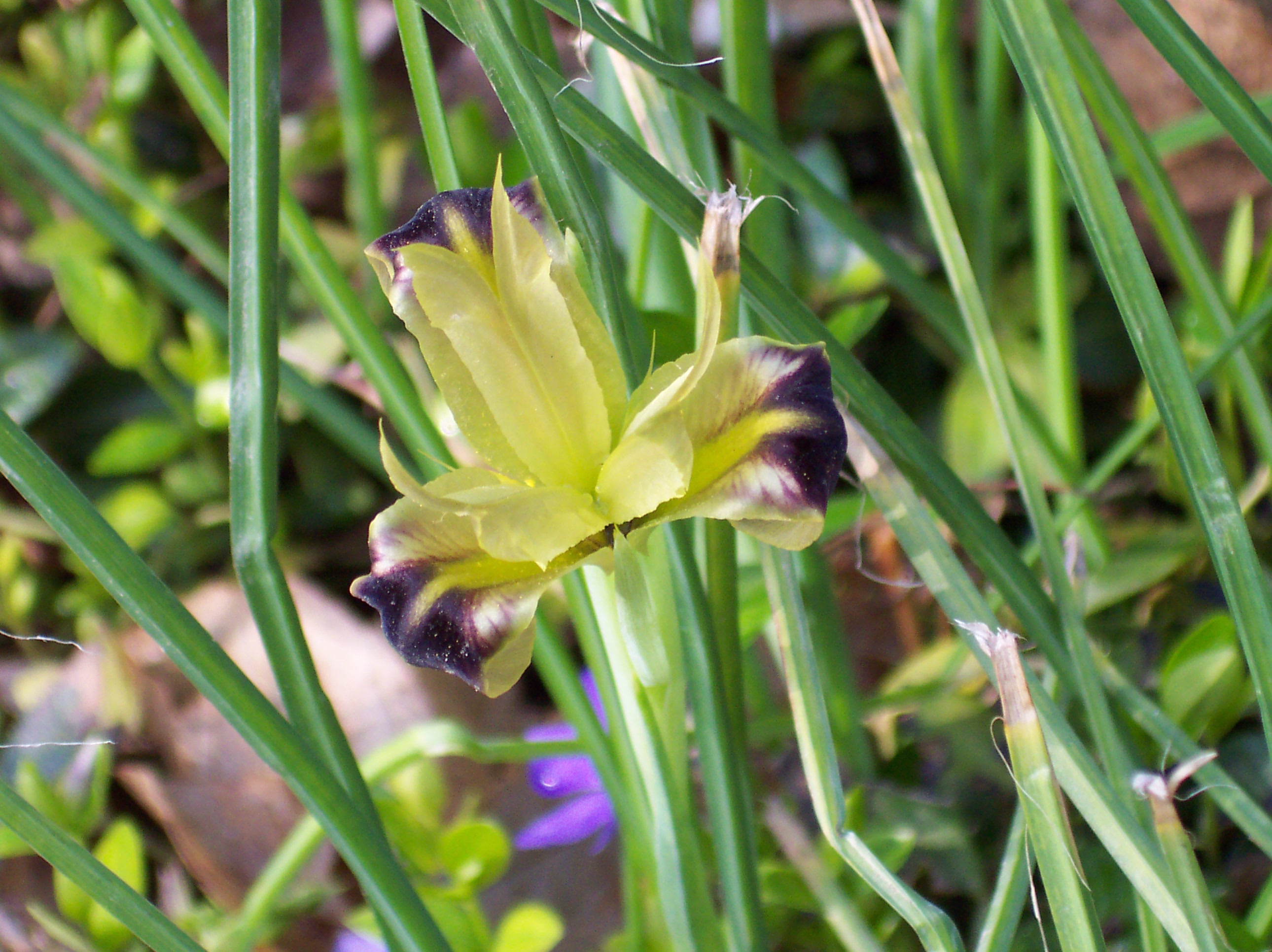 Hermodactylus tuberosus. Real Jardín Botánico, Madrid.